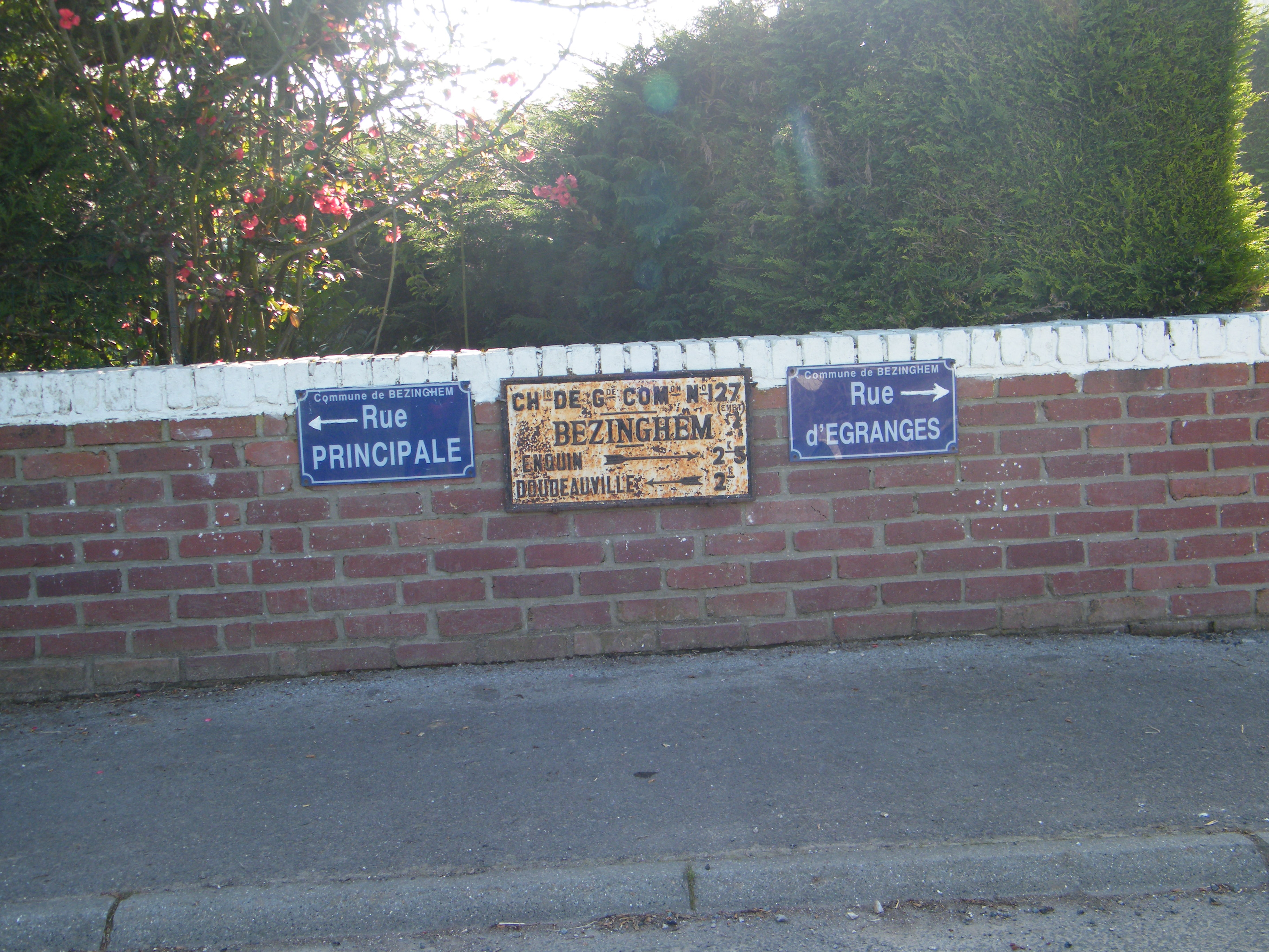 Bezinghem, Pas-de-Calais, Fr, signalisation routière.